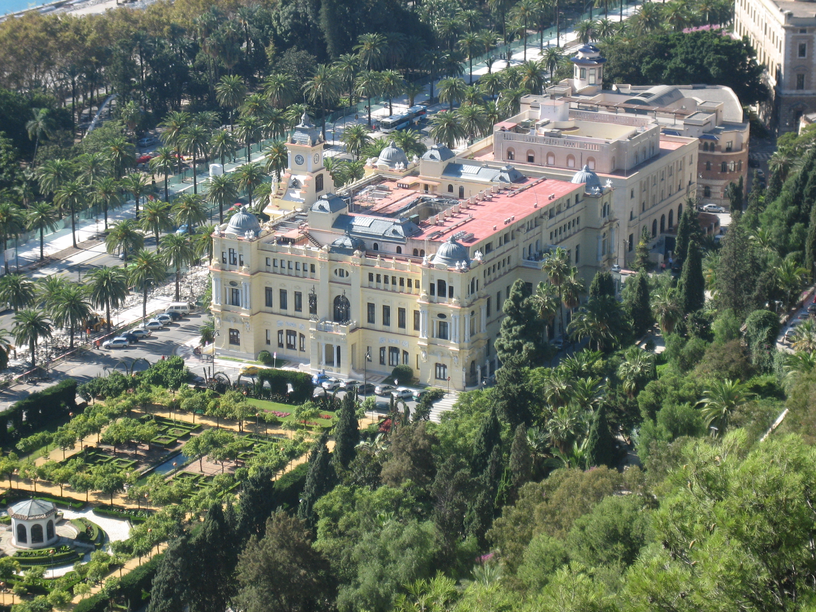 Lateral del Ayuntamiento de Málaga visto desde Gibralfaro